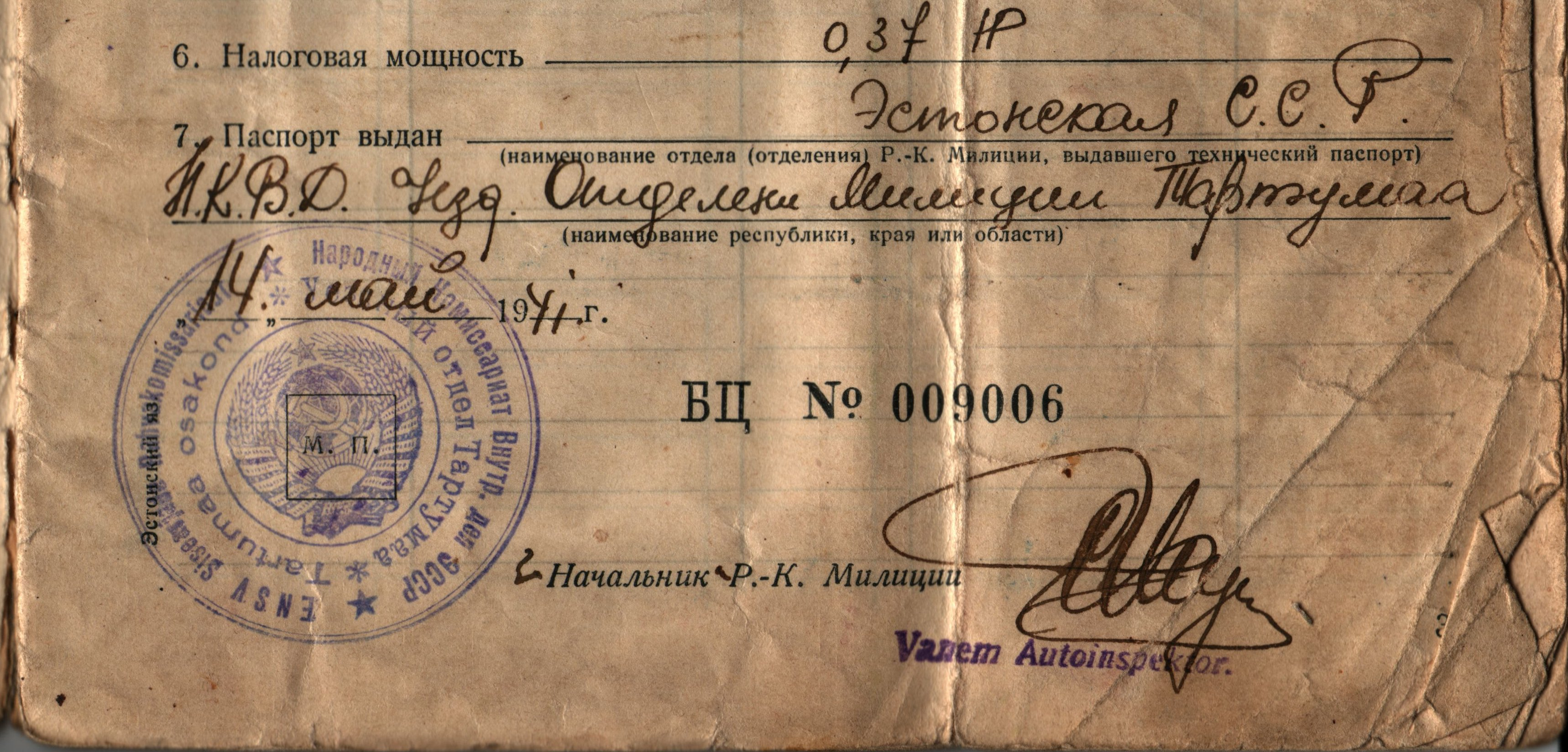 Fragment ENSV SaRK Miilitsa Tartumaa osakonna poolt välja antud auto-moto-sõiduki tehnilisest passist